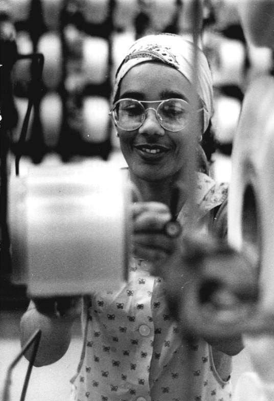 Schwarza, kubanische Gastarbeiterin ADN-ZB Kasper 8.9.86 Bez. Gera: Jugend-Für ihre guten Lern- und Arbeitsergebnisse konnte vor wenigen Tagen Nilda Madraso aus Kuba als Aktivist ausgezeichnet werden. Sie erlernte im Stammbetrieb des Chemiefaserkombinates "Wilhelm Pieck" Schwarza den Beruf eines Chemiefaserfacharbeiters. Noch im September heißt es für Nilda Abschied zu nehmen von den Mitgliedern des Arbeitskollektivs, der Jugendbrigarde "Fortschritt" in der Schärerei II des Polyamidseidenbetriebes.